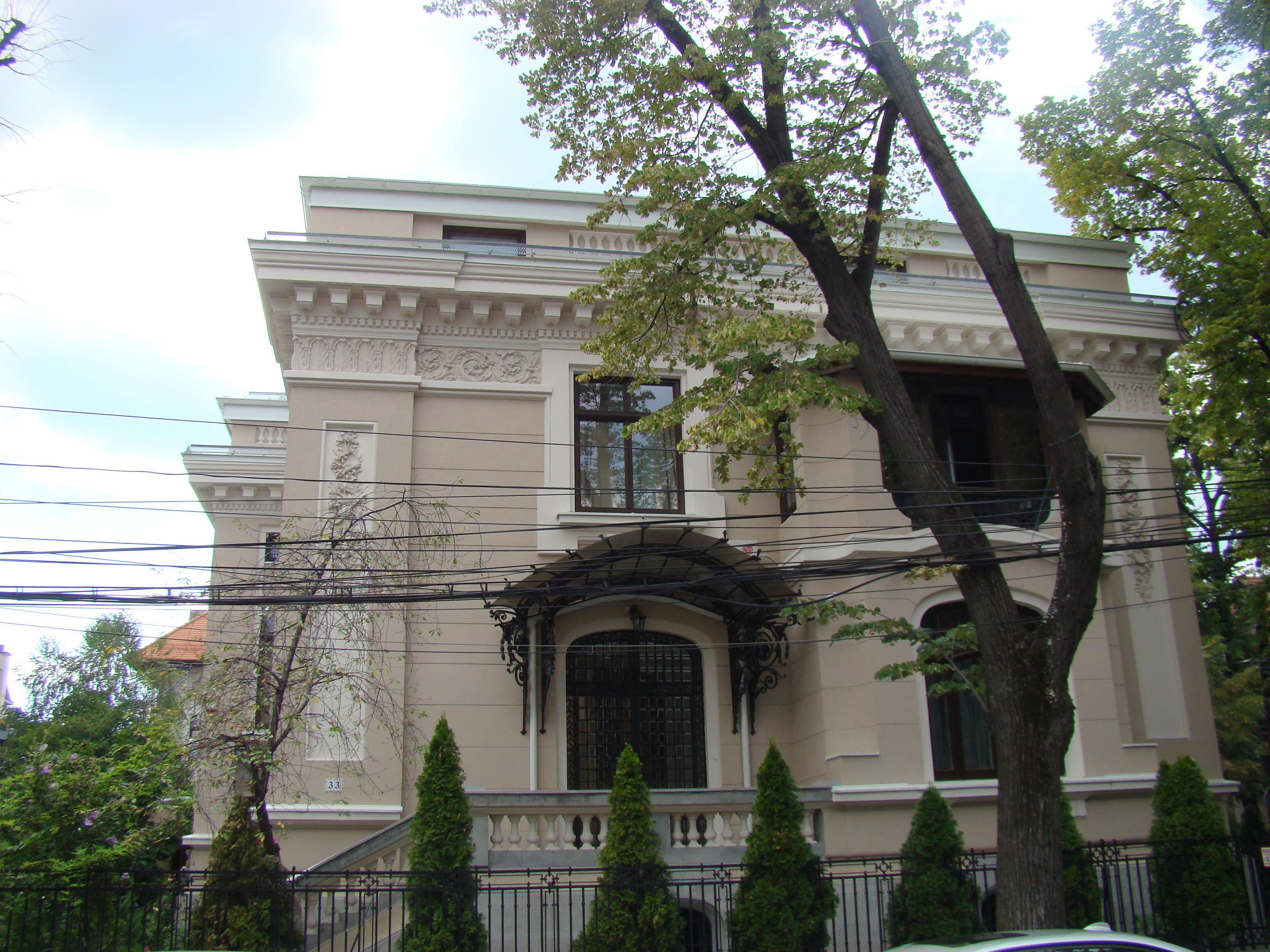 Casă monument istoric, str.Londra, nr.33